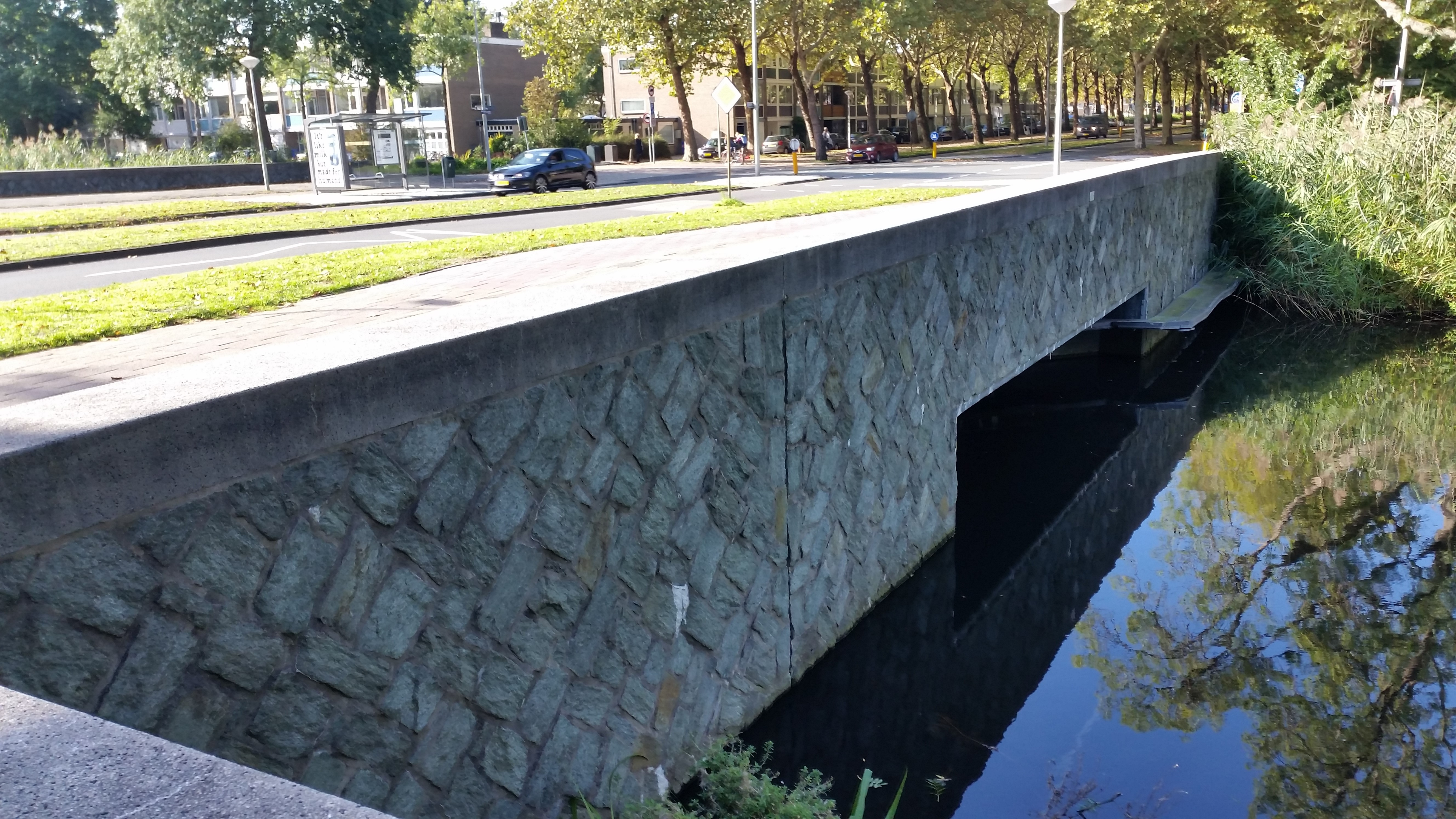 Brug 803, M.Justbrug, zijaanzicht